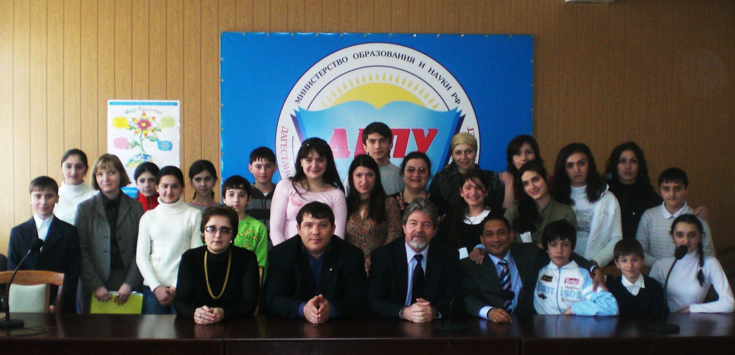 Встреча со школьниками в ДГПУ. Во встрече принял участие ректор Джафар Маллаев